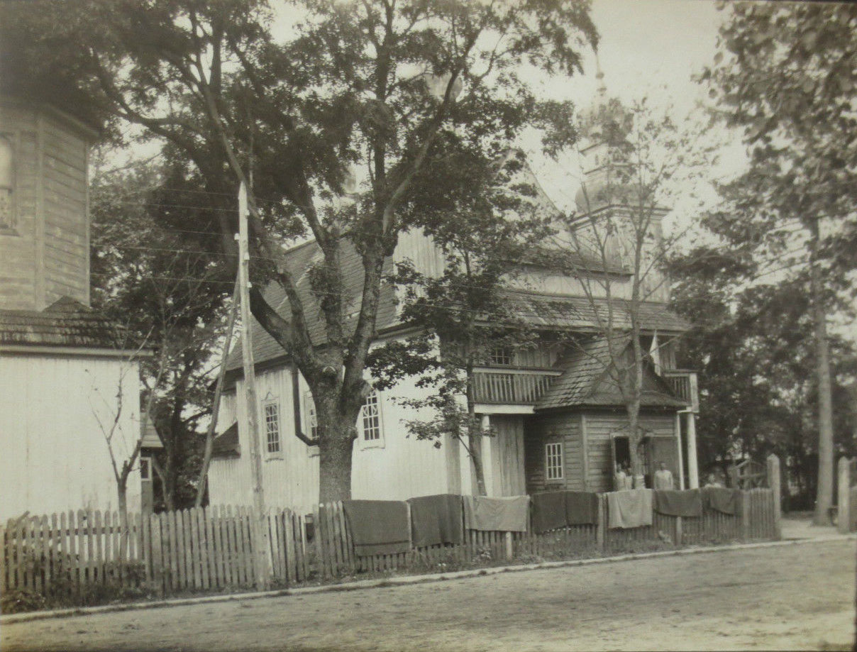 Беларуская (тарашкевіца): Дывін (Dyvin), вуліца Кобрынская (vulica Kobrynskaja). Царква Сьвятой Параскевы Пятніцы